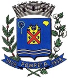 Bandeira do município de Pompeia - SP - Brasil.